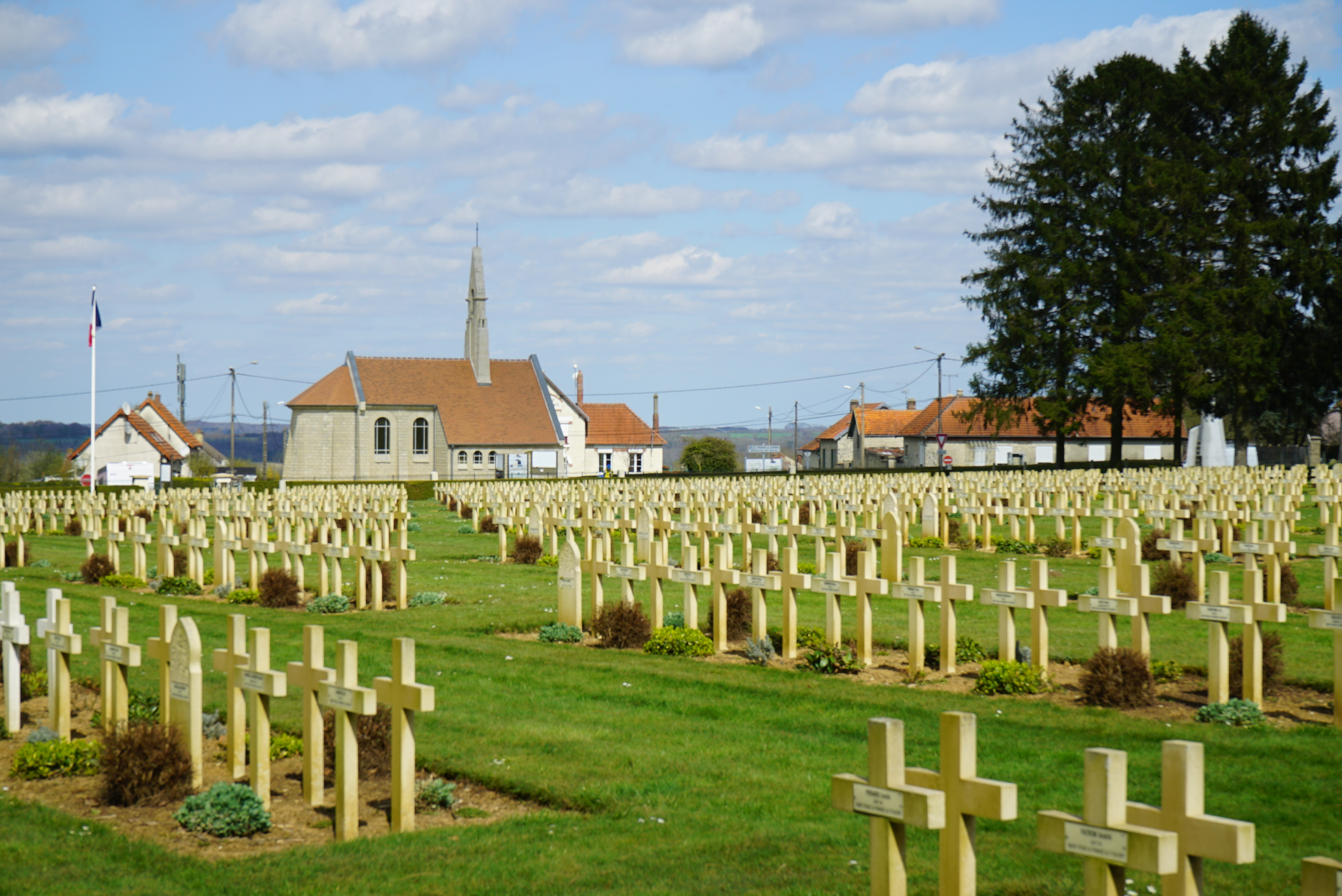 vue de la Necropole nationale de Cerny-en-Laonnois et de la chapelle.